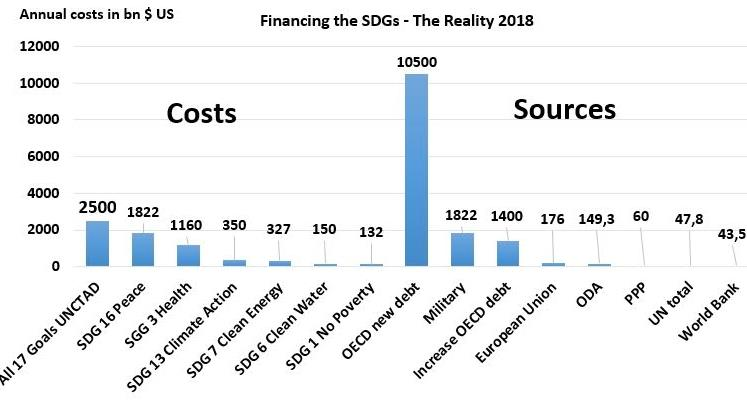 Kostenvergleich der UN-Nachhaltigkeitsziele für 2030